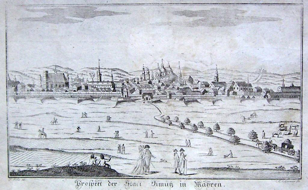 "Prospekt der Stadt Olmütz in Mähren". Kupferstich von J. Eder nach A. Sommer, Wien um 1795, Platte 17 x 27 cm